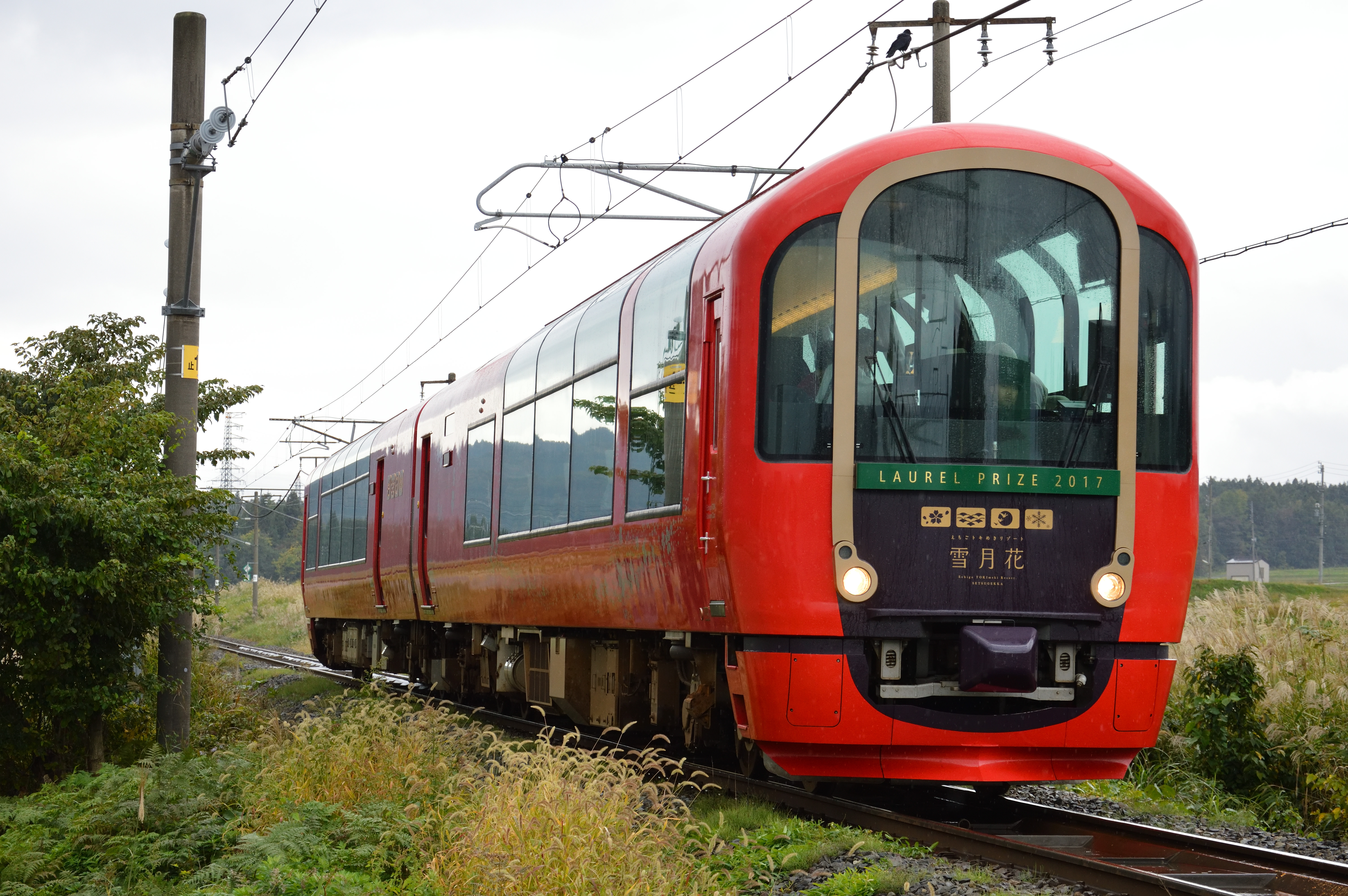 2017年ローレル賞受賞記念ステッカーを前面に貼り、走行するET122形1000番台「えちごトキめきリゾート雪月花」。妙高高原 - 関山駅間にて。 Nikon D3200